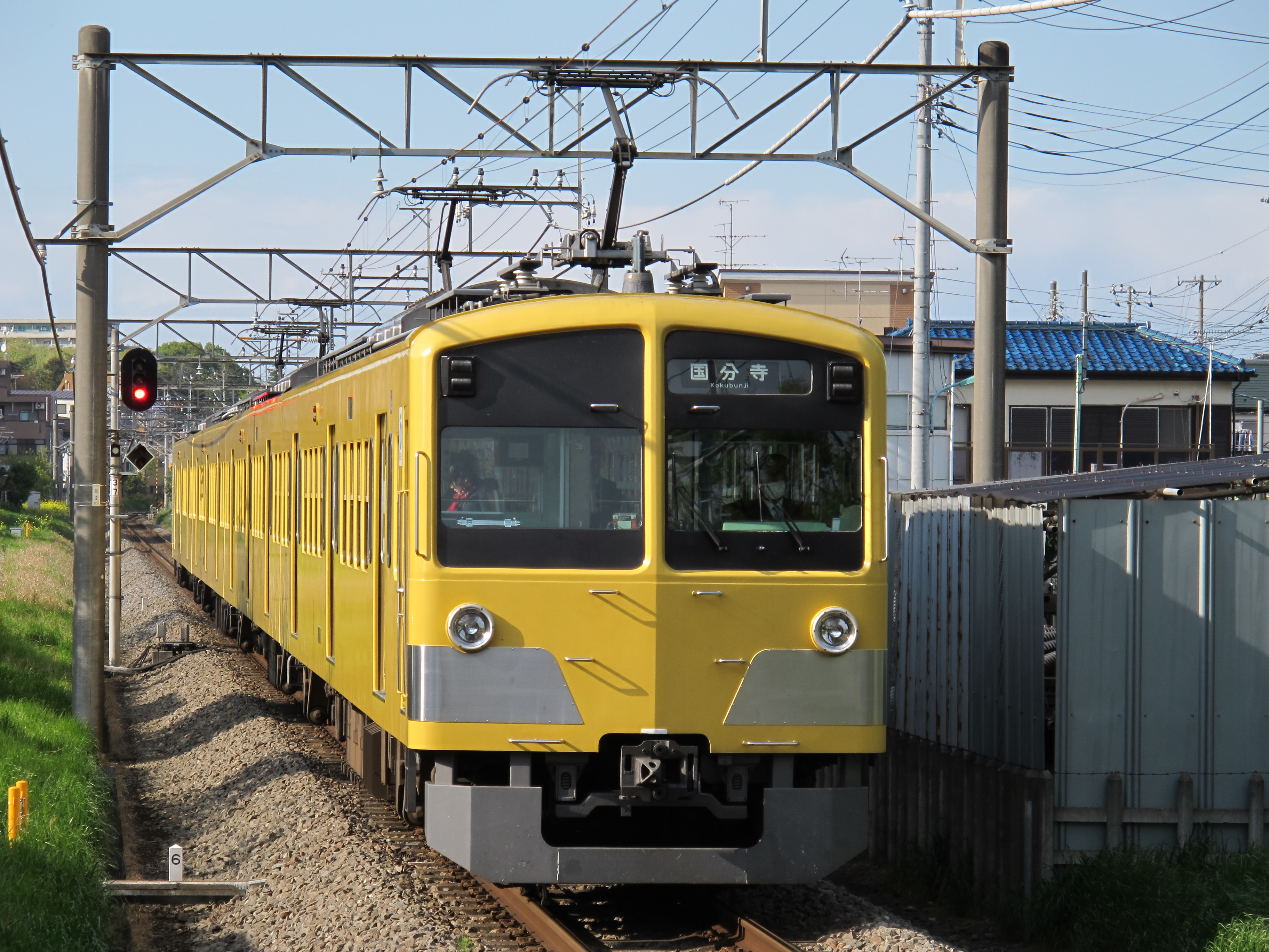 西武多摩湖線、青梅街道駅にて撮影。